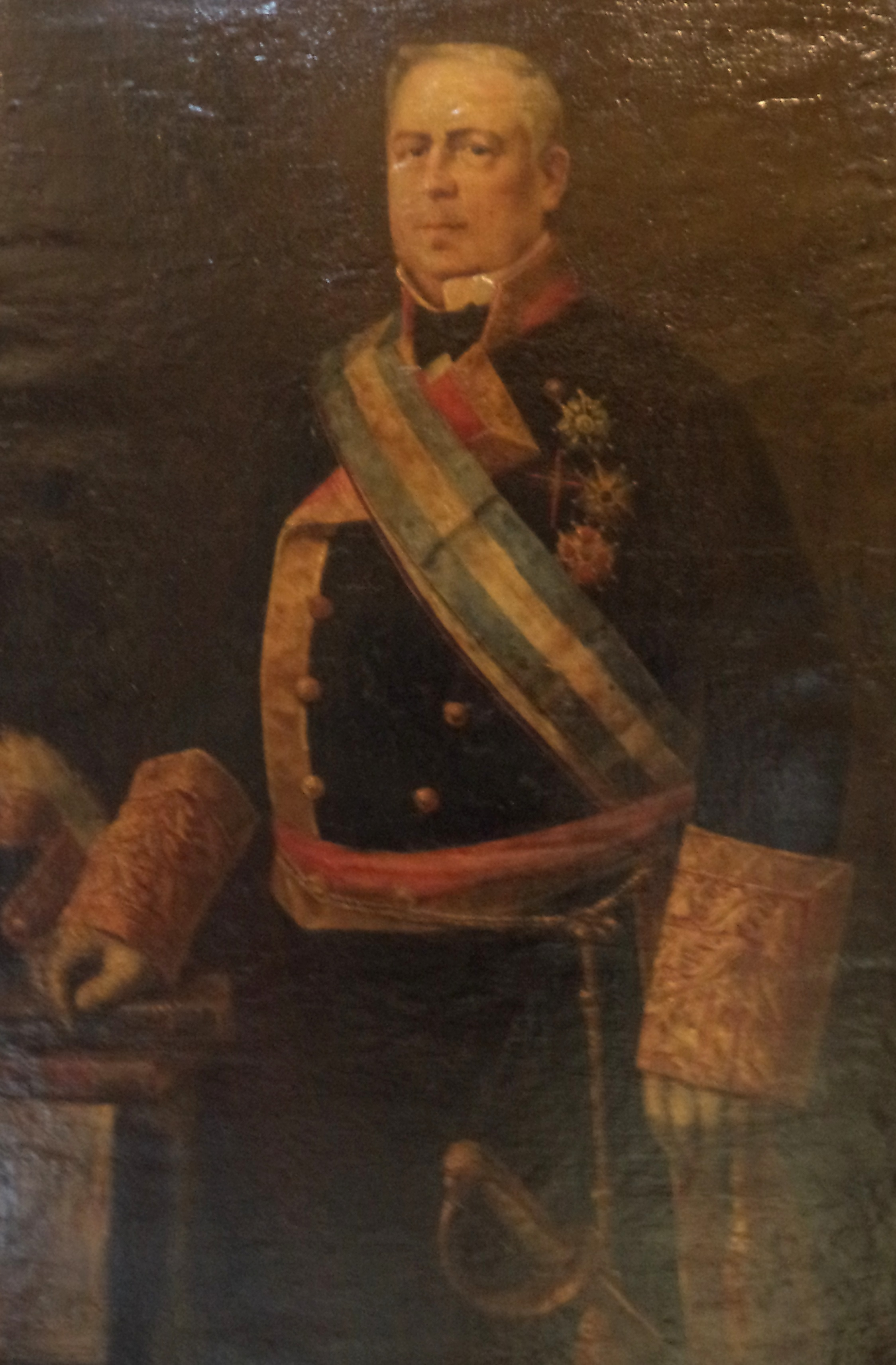 Retrato del marino y político español Francisco Armero Peñaranda (1804-1866), primer marqués del Nervión y grande de España.